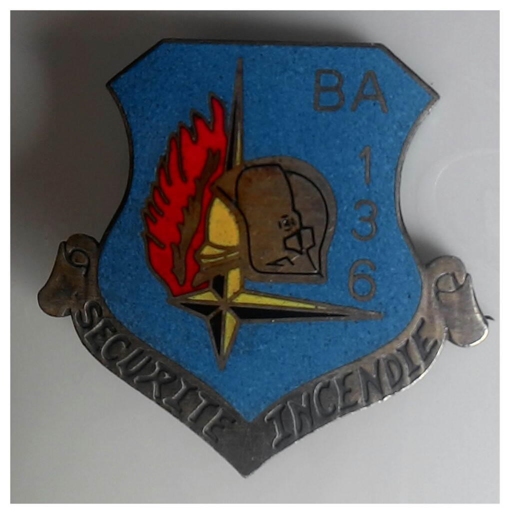 insigne des pompiers de la base aérienne 136 Toul